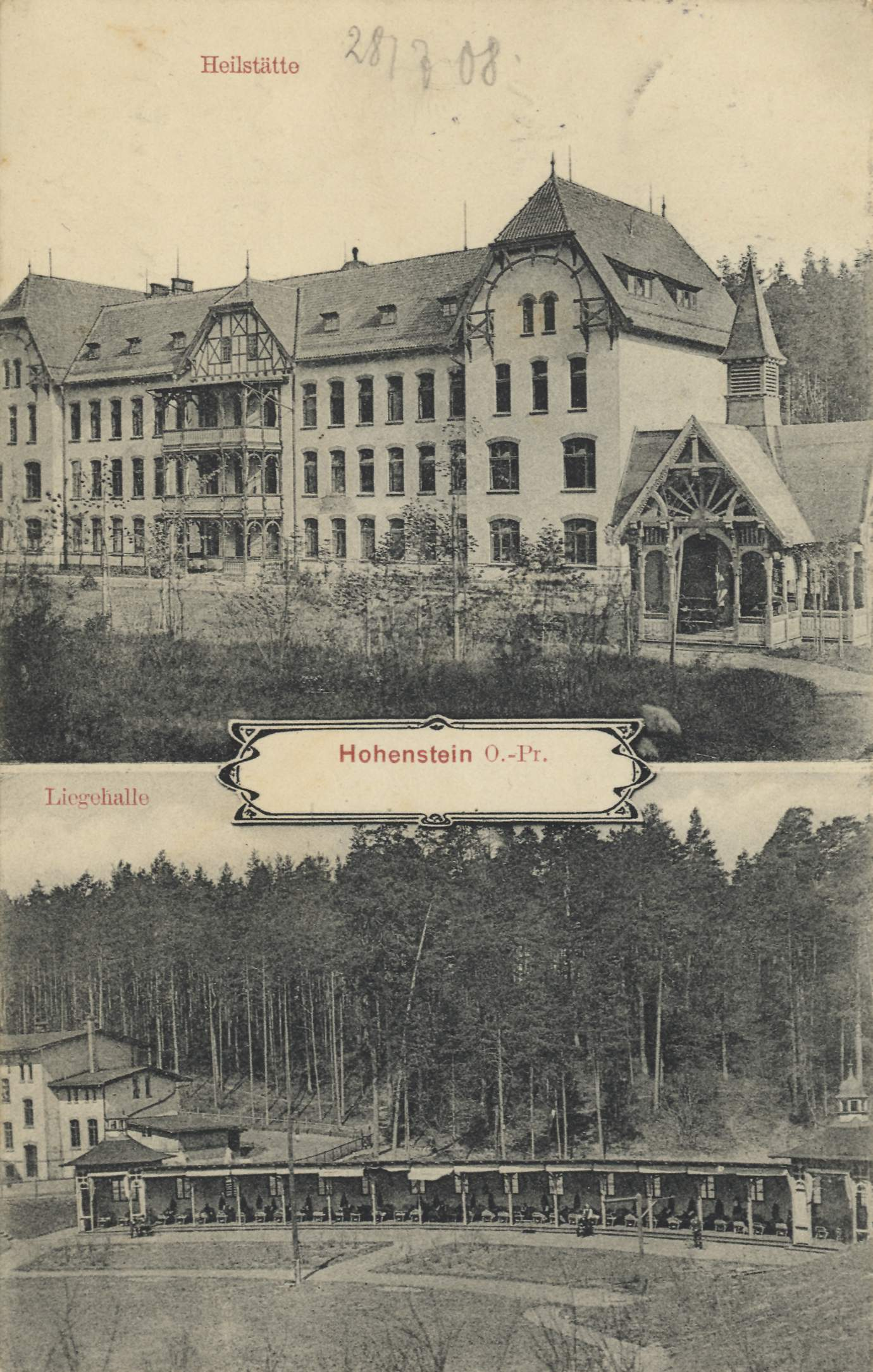 Heilstätte; Liegehalle